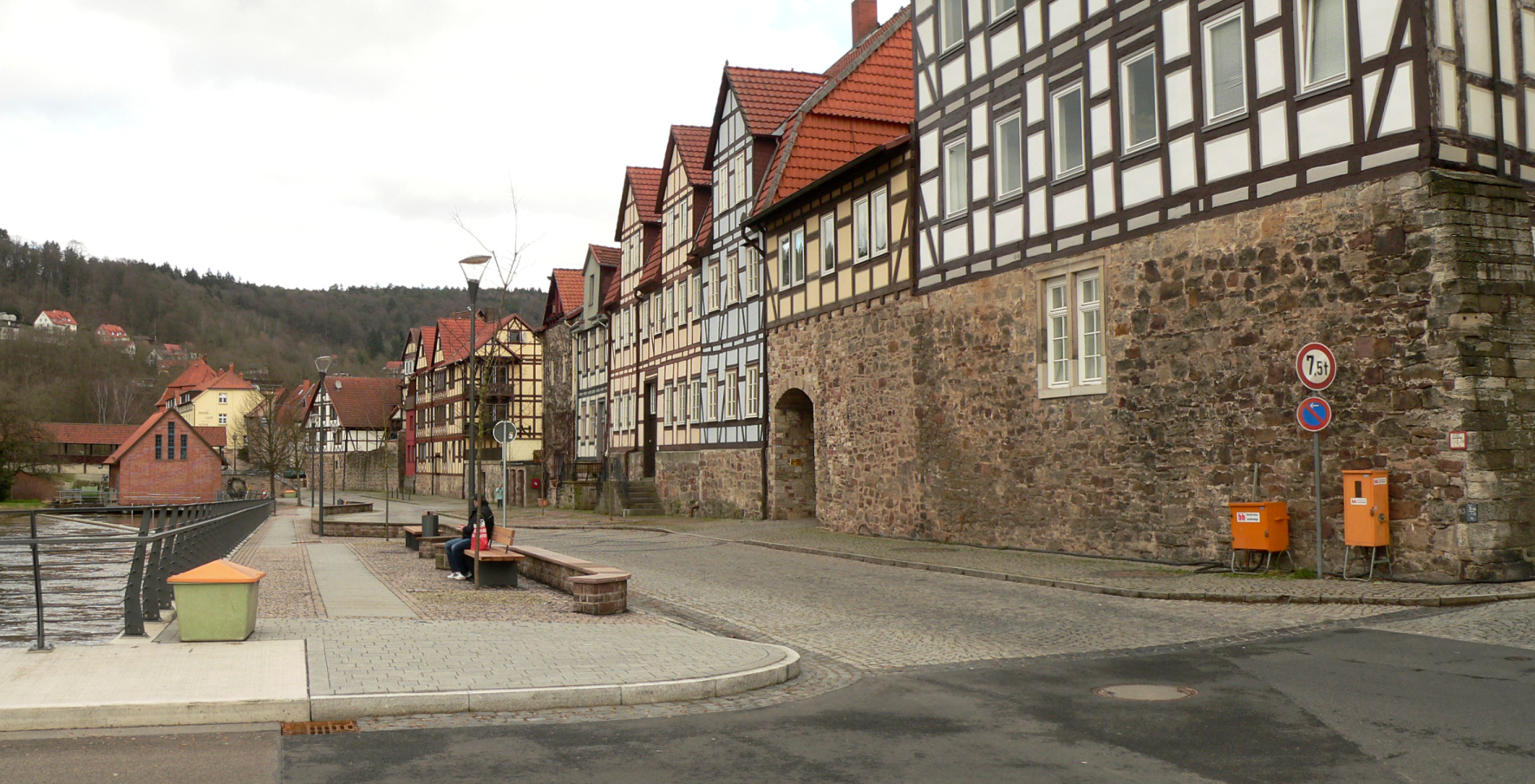 Kasseler Schlagd, bereits umgestaltet und mordernisiert